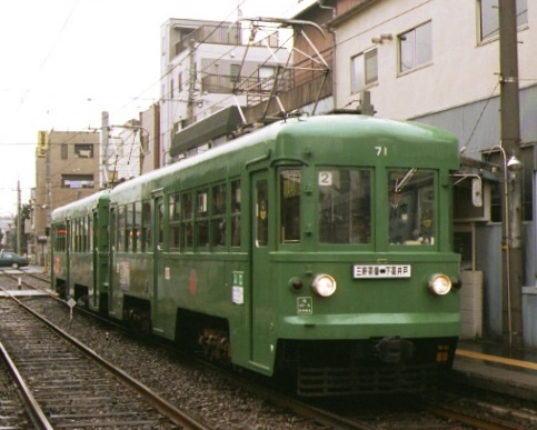 東急70形 デハ71号